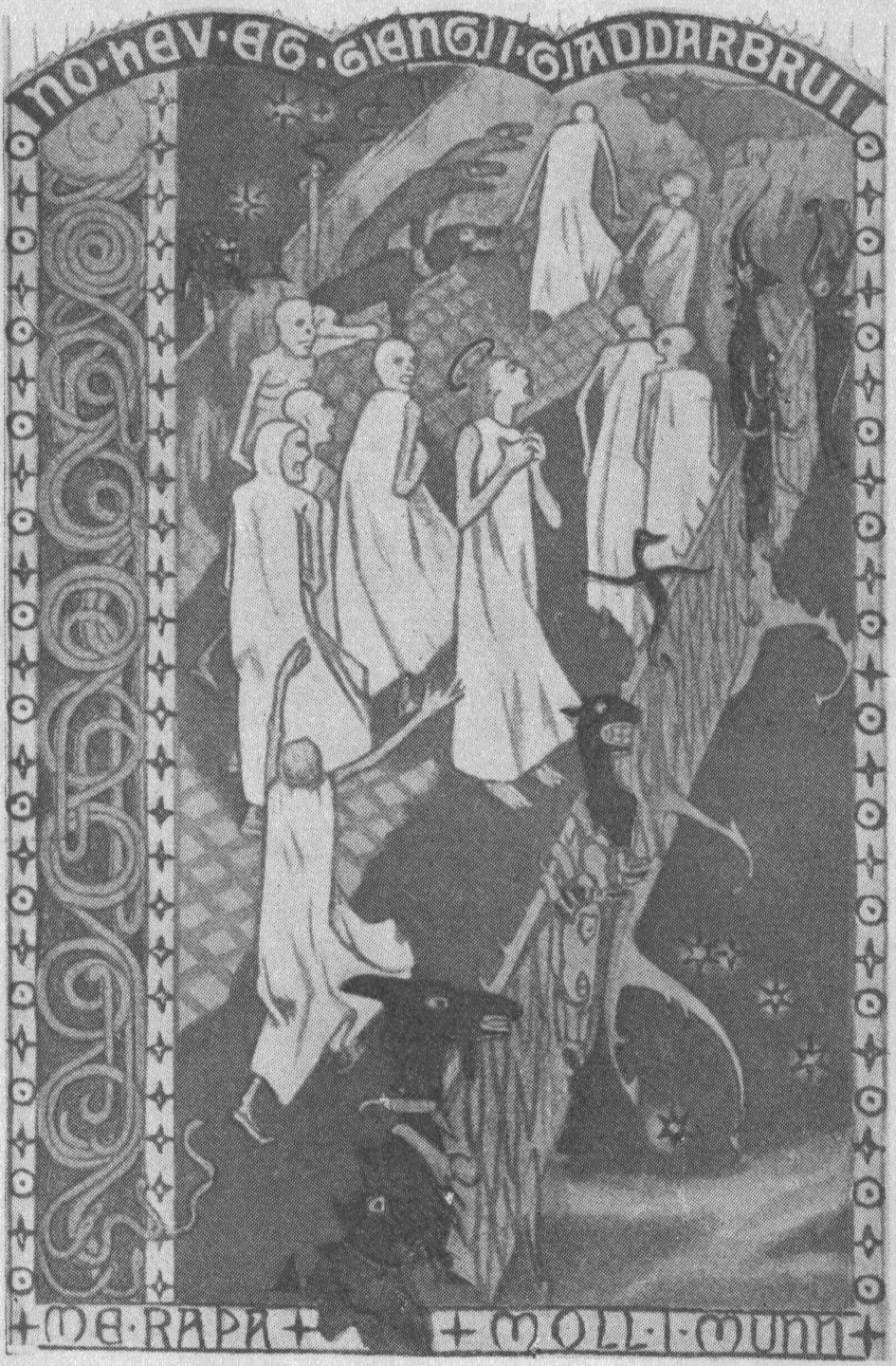 Gjallarbrui. Illustrasjon av Gerhard Munthe på side 10 i Norsk forening for bogkunsts utgave av Draumkvæde, 1904.